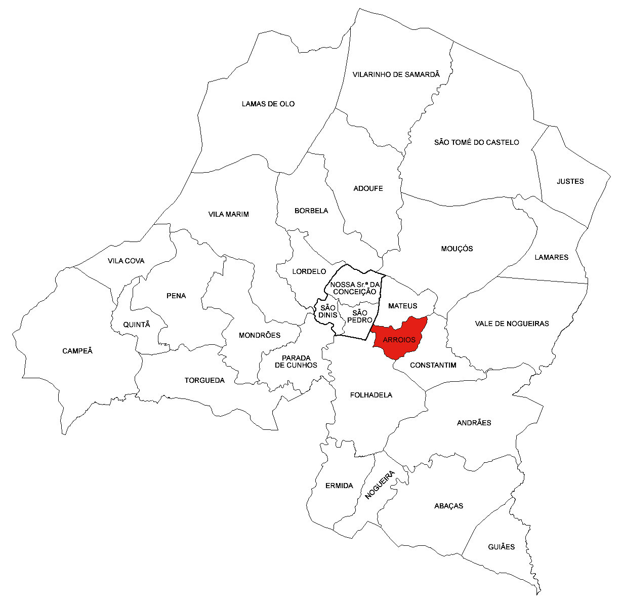 Freguesia de Arroios (concelho de Vila Real)